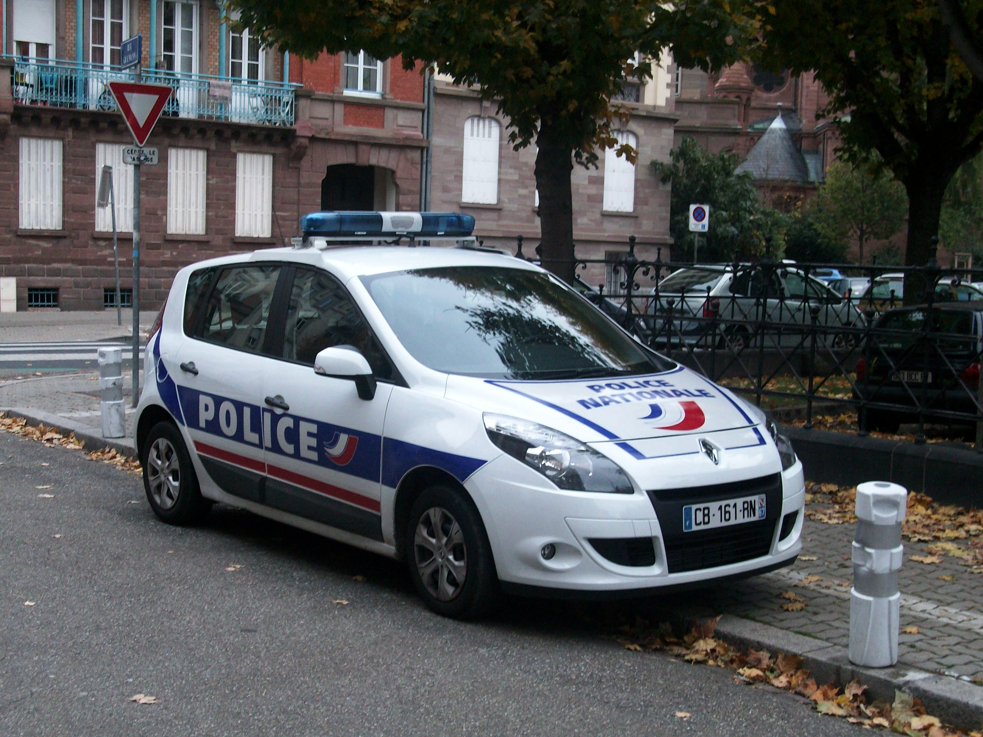 Véhicule de la Police nationale à l'arrière du TGI de Strasbourg